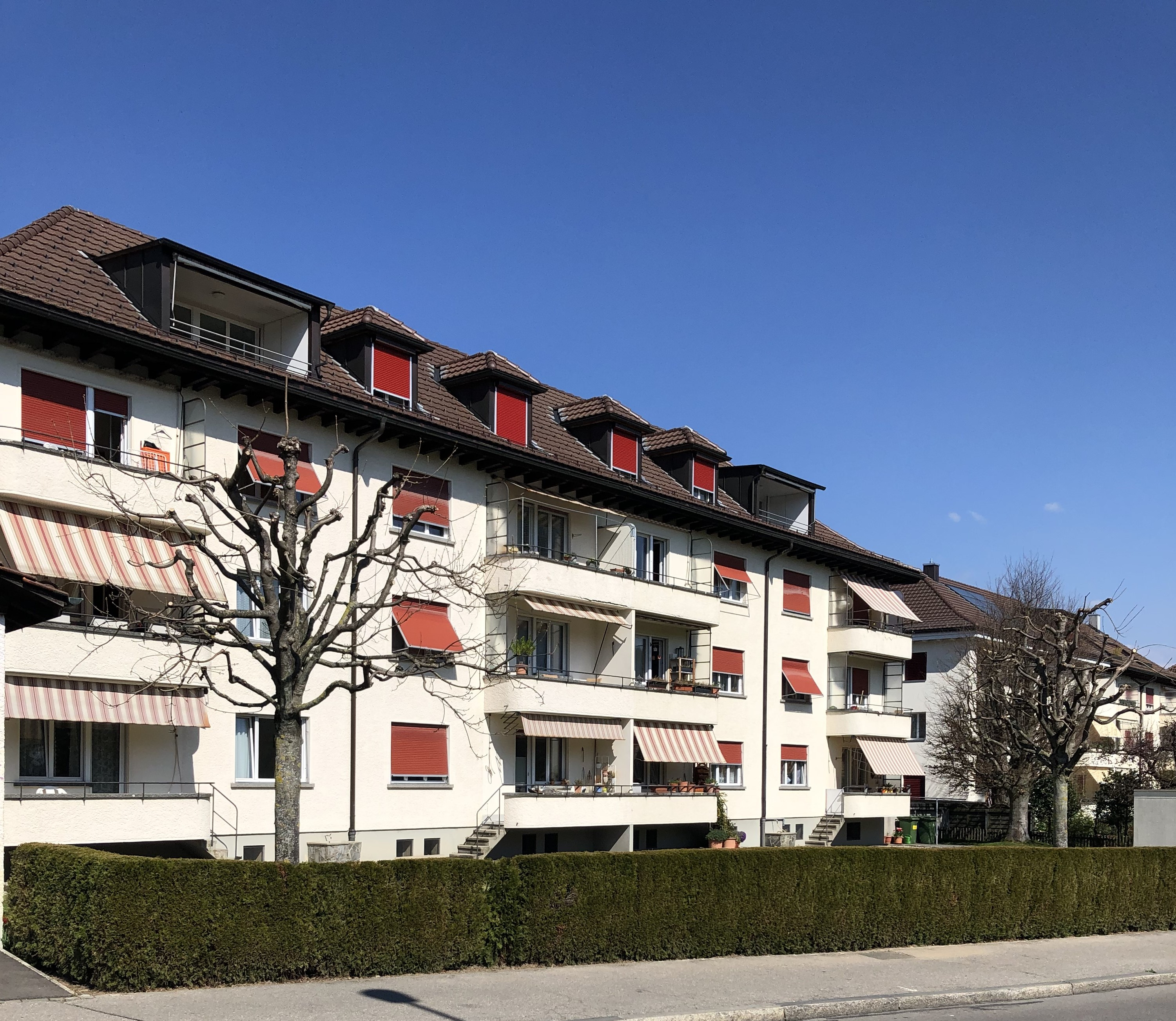 Kleefeld Bebauung Siedlung